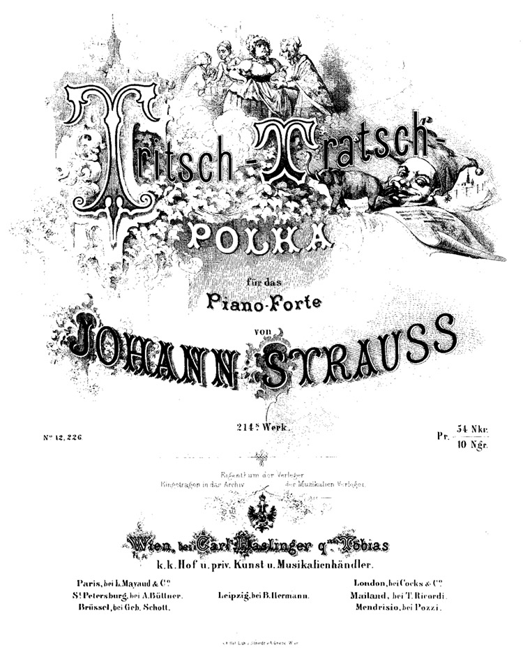 Tritsch-Tratsch-Polka für das Piano-Forte von Johann Strauss. Titelblatt der bei Carl Haslinger erschienenen Klaviernoten.